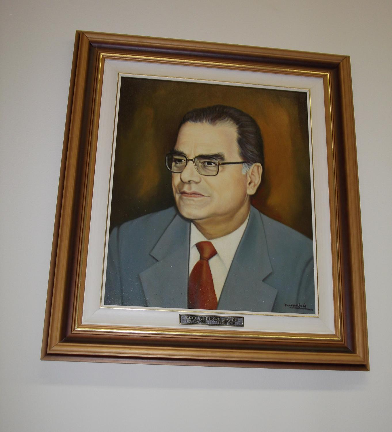 Gerhard Jacob, Professor do Instituto de Fásica. Foi reitor da UFRGS ao rasgar o compromisso assumido e assinado de não aceitar o o cargo se não fosse o primeiro colocado nas eleições diretas para reitor.